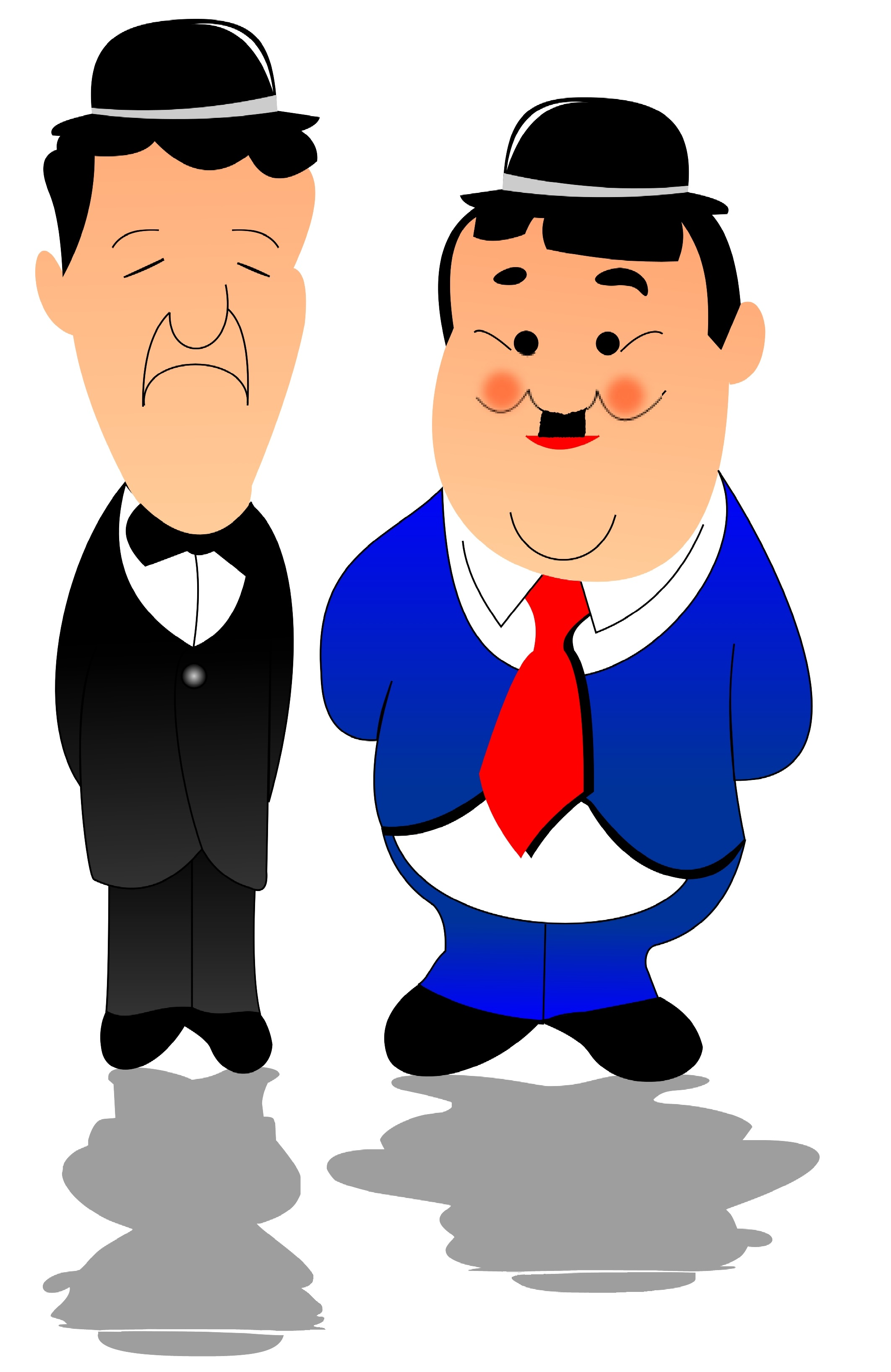 Caricatura del Gordo y el Flaco